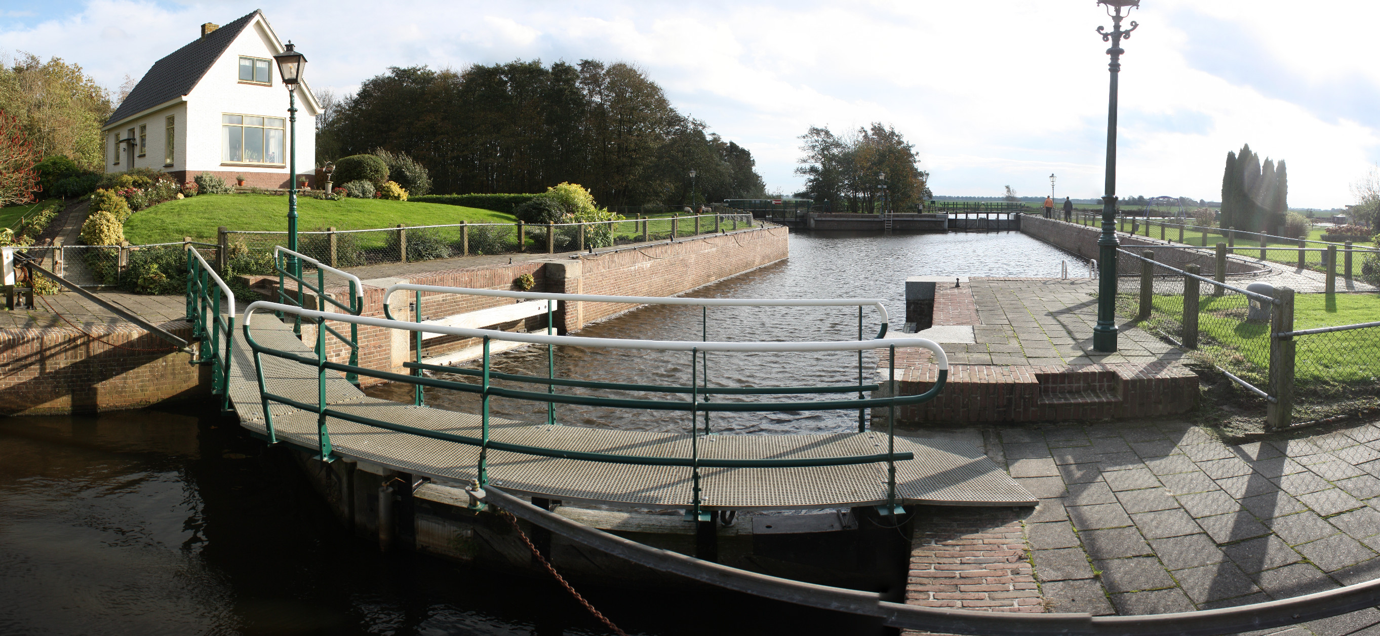 Driewegsluis bij Nijetrijne Template:Coordinates